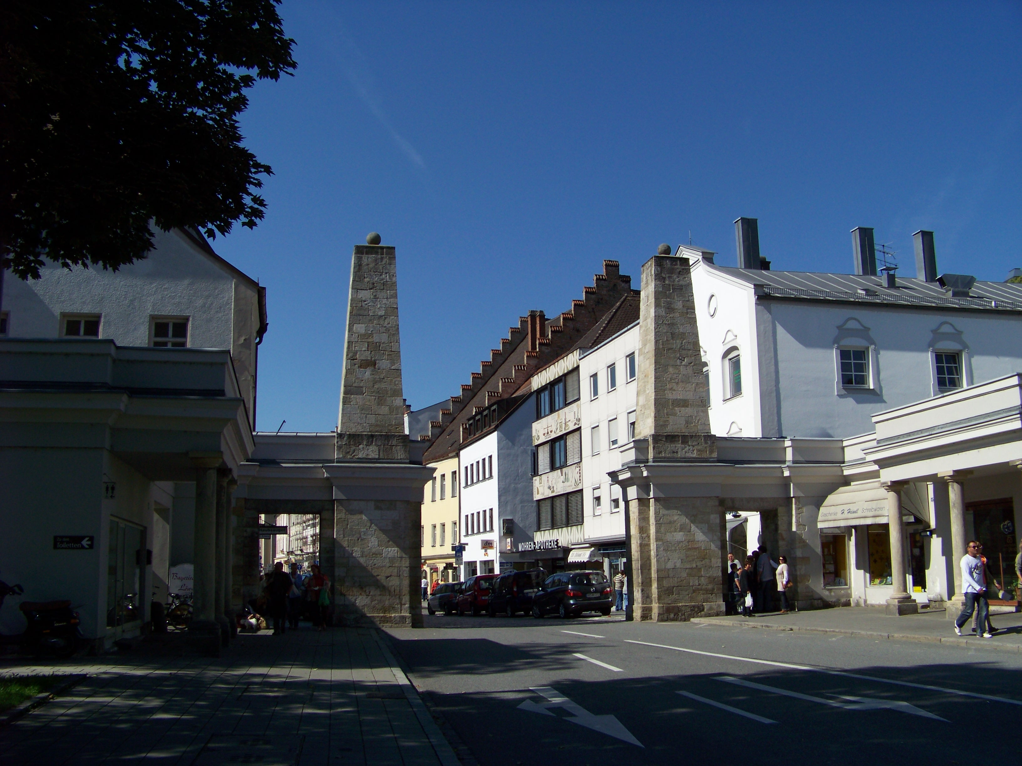 Straubing, Ludwigsplatz 48 - 49. Ludwigstor, klassizistische Stadttoranlage, bestehend aus offener Einfahrt mit flankierenden Obelisken, seitlichen Durchgängen und vorgelagerten Pavillons mit Säulenportici, 1810.